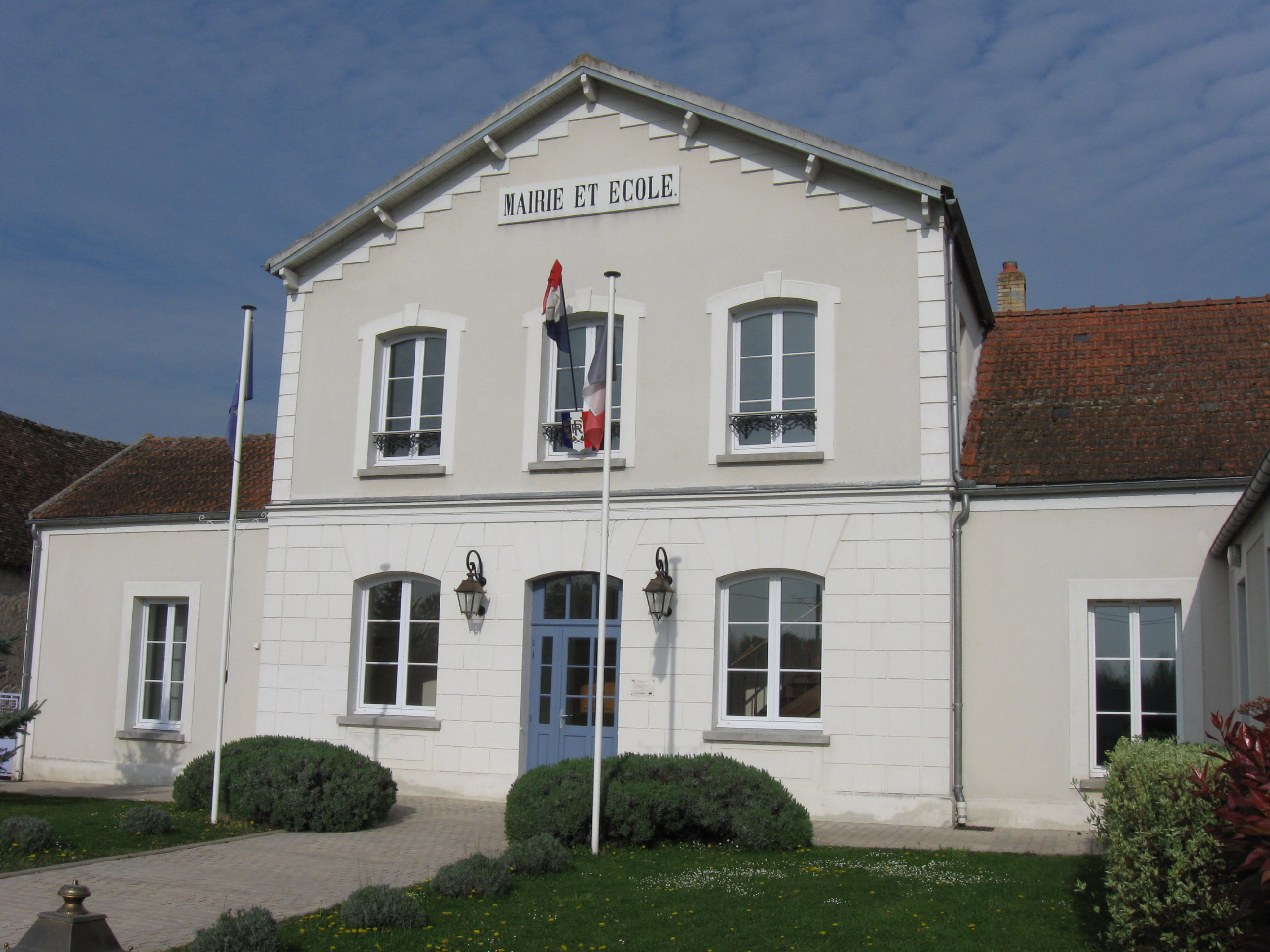 Mairie de Mouy-sur-Seine. (Seine-et-Marne, région Île-de-France).